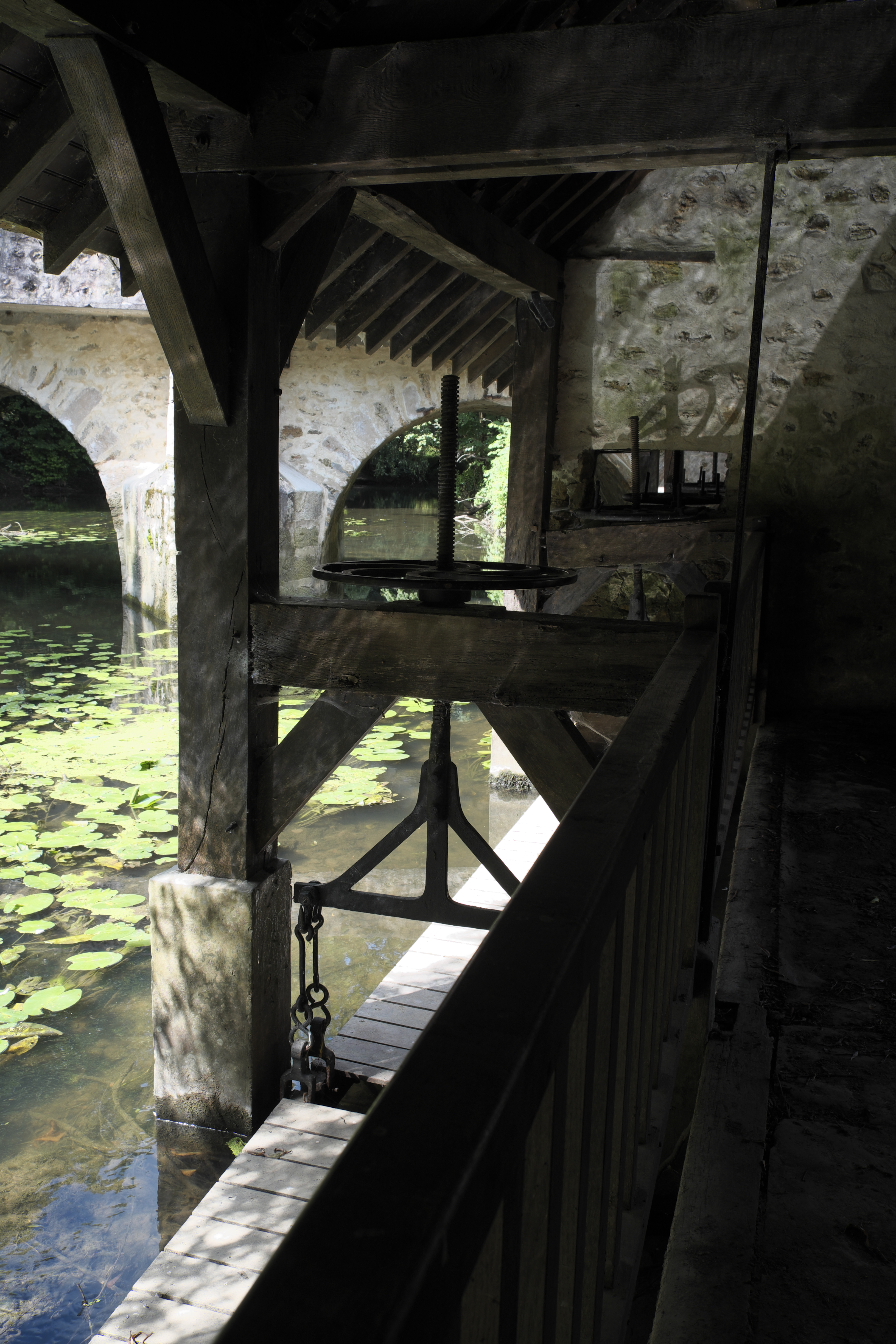 Waschhaus (lavoir) in Boussy-Saint-Antoine im Département Essonne (Île-de-France/Frankreich), im Hintergrund alte Brücke (vieux pont)